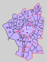 大阪府西成郡の町村制時点の町村。